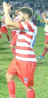 Филип Кнежевић у дресу чачанског Борца